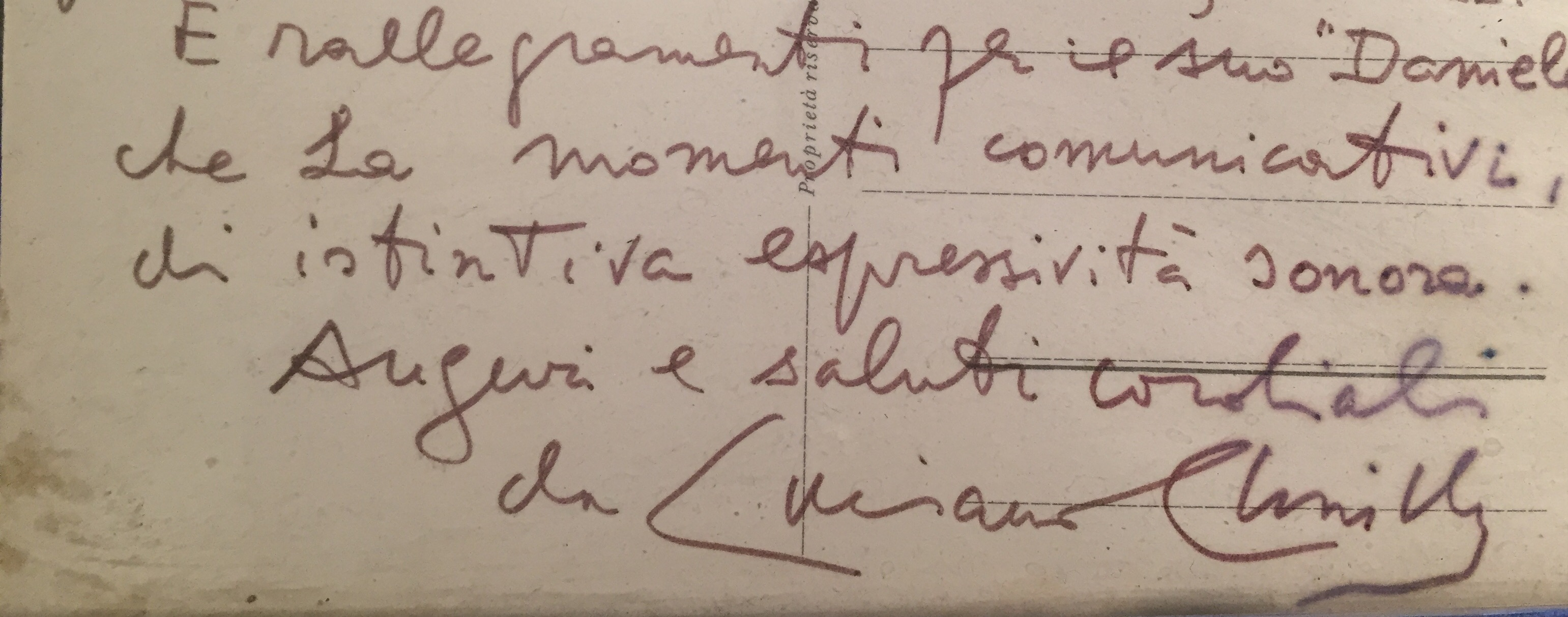 Nota autografa del M° Luciano Chailly riguardante le musiche di Igor Merlini